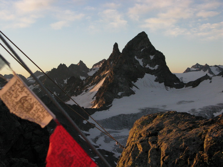 Der Große Litzner (links) und das Große Seehorn (rechts) von der Westlichen Plattenspitze aus gesehen